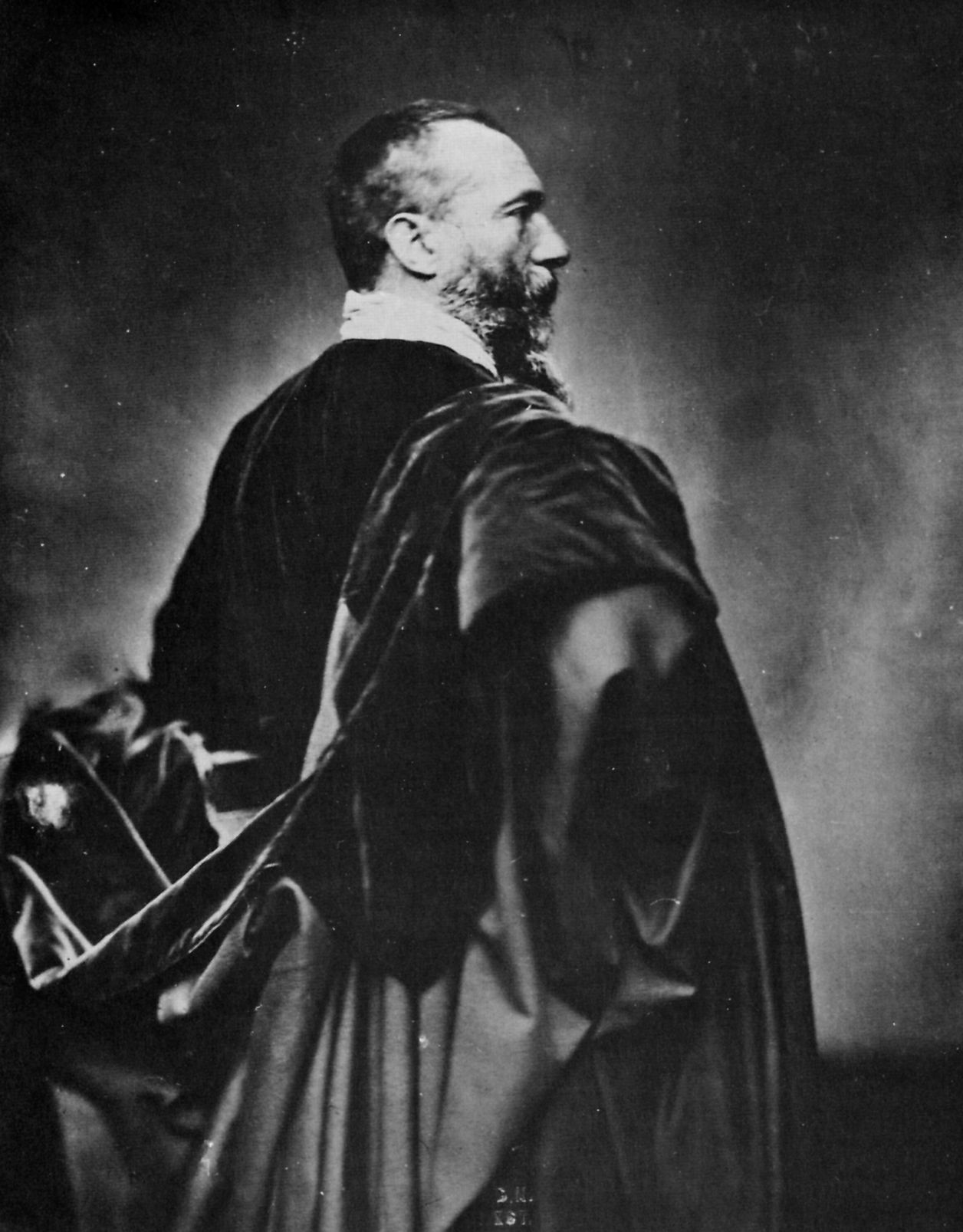 Jean-Baptiste Alphonse Karr: 240 x 187 mm, Kollodium auf Glas